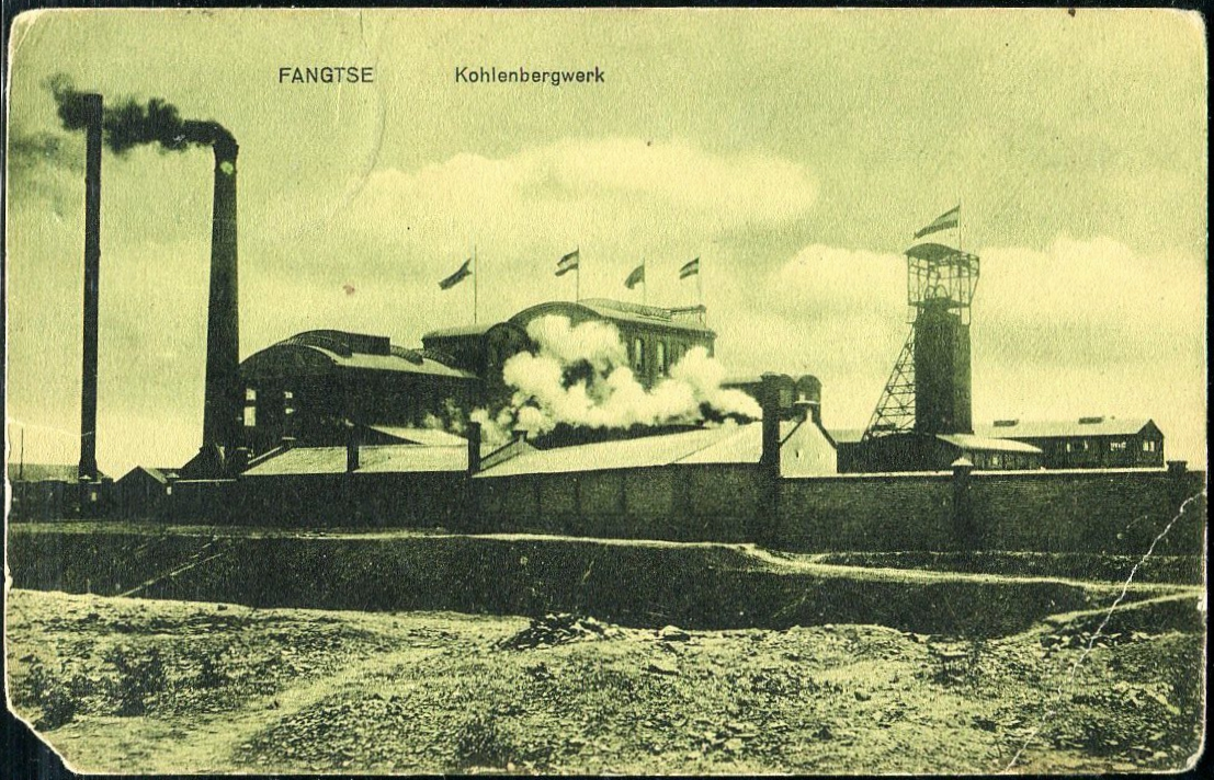 坊子煤矿旧明信片